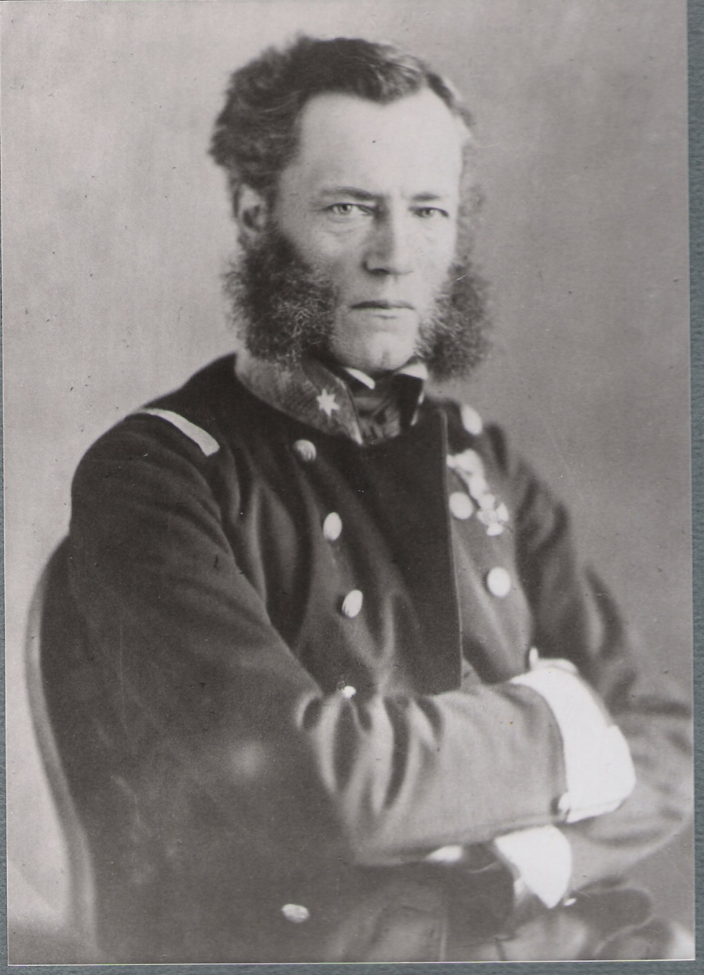 Ludwig Anton Ritter von Fautz; Vizeadmiral und österreichischer Marinekommandant (1811-1880)